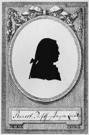 Jørgen Henrik Rawert (16.08.1751-14.07.1823) professor, ingeniørløjtnant, arkitekt